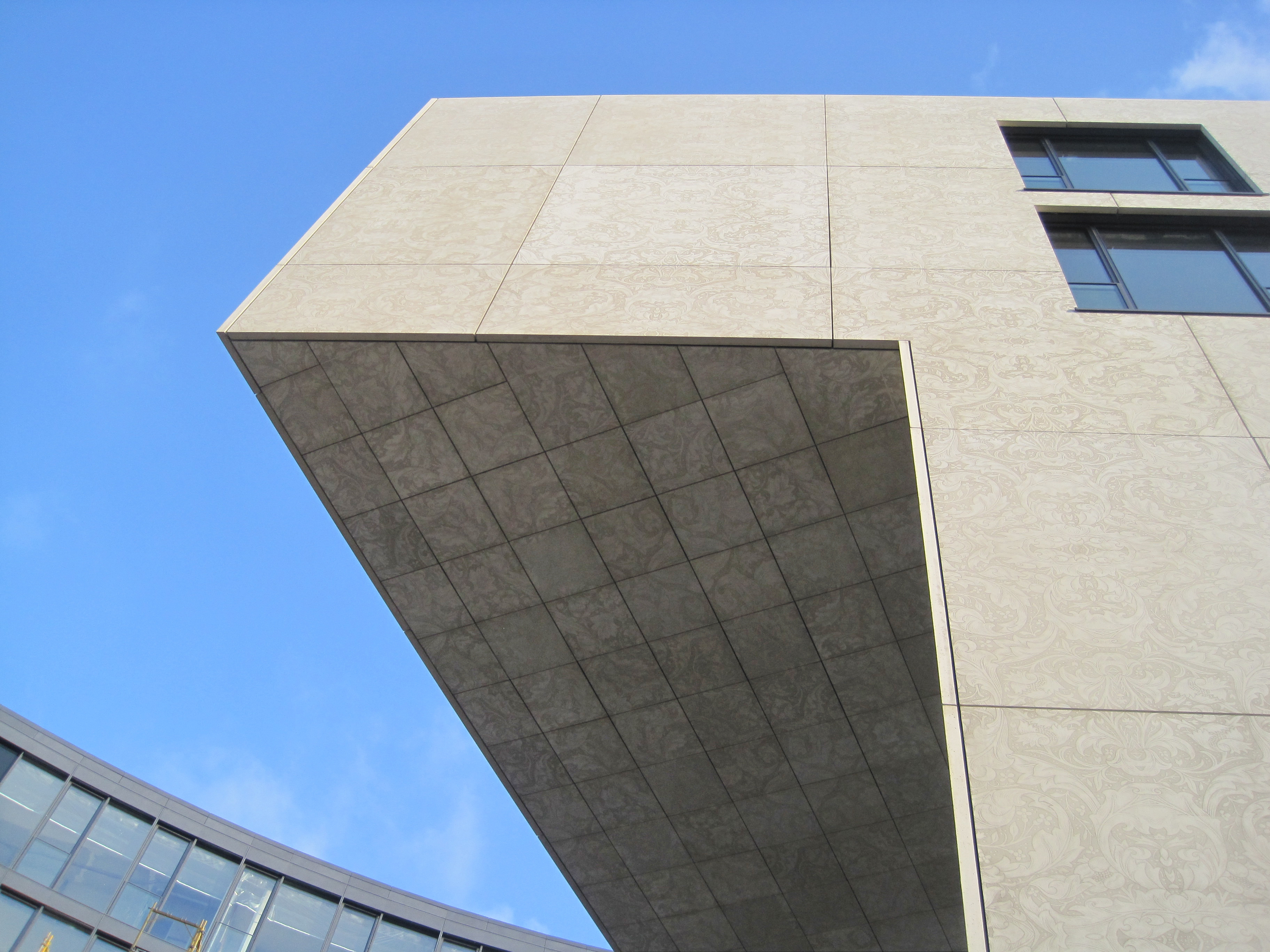 Außenfassade Hotel Stue in Berlin mit Fotobeton